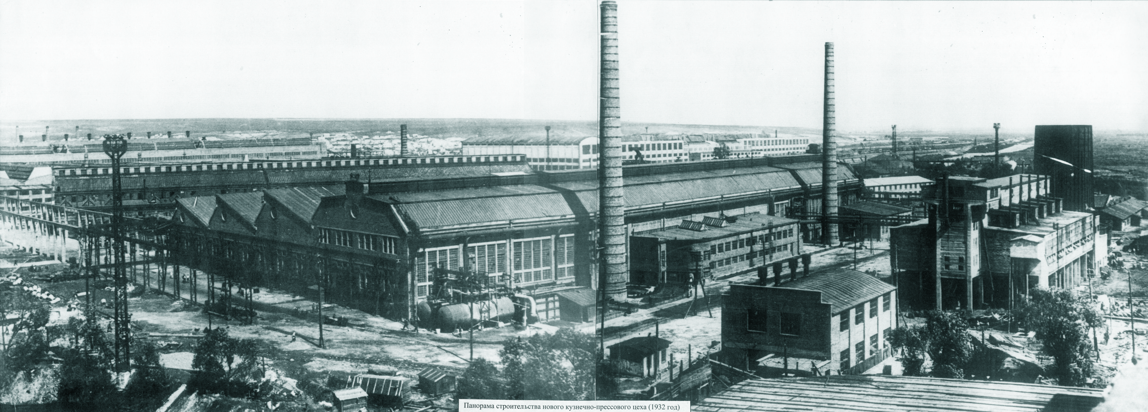 Панорама строительства нового кузнечно-прессового цеха. Луганск, Украина. 1932 год.